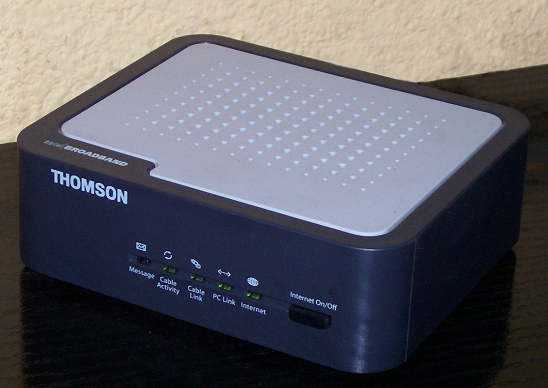 Slika mog modema Thomson.